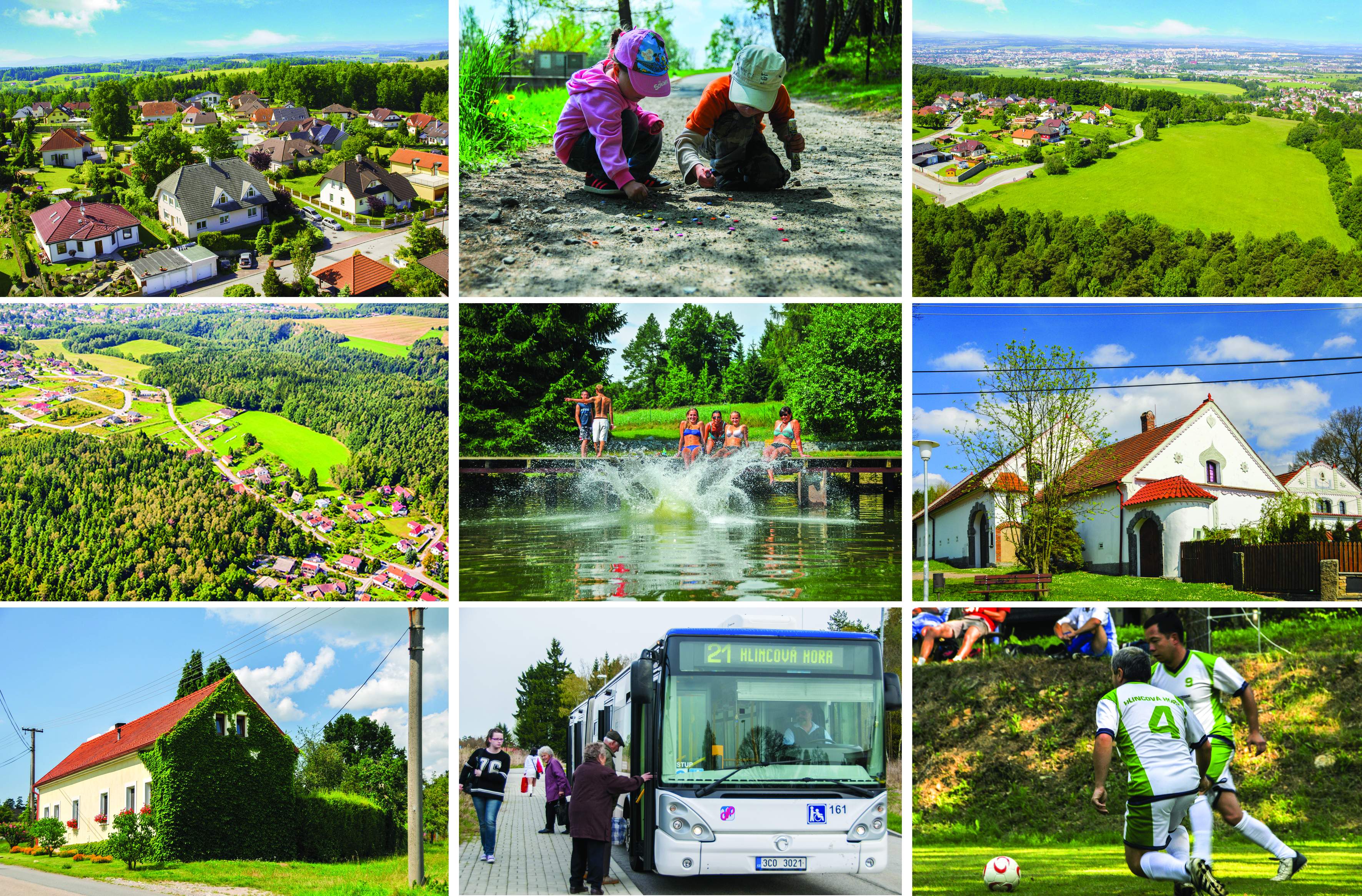 Koláž Hlincové Hory, České Budějovice